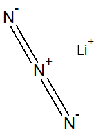 vzorec azidu lithného